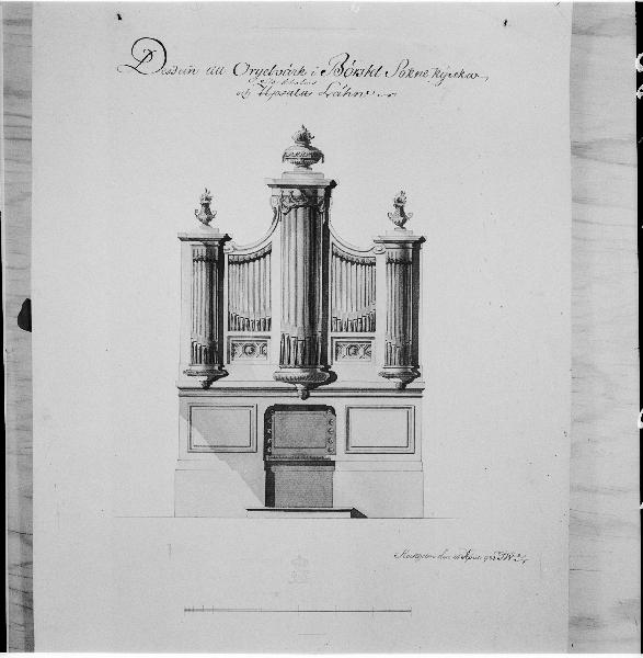 Ritning till orgelfasad 1783. Avfotograferad. Kategori: (02) OrglarRitning till orgelfasad 1783. Avfotograferad.